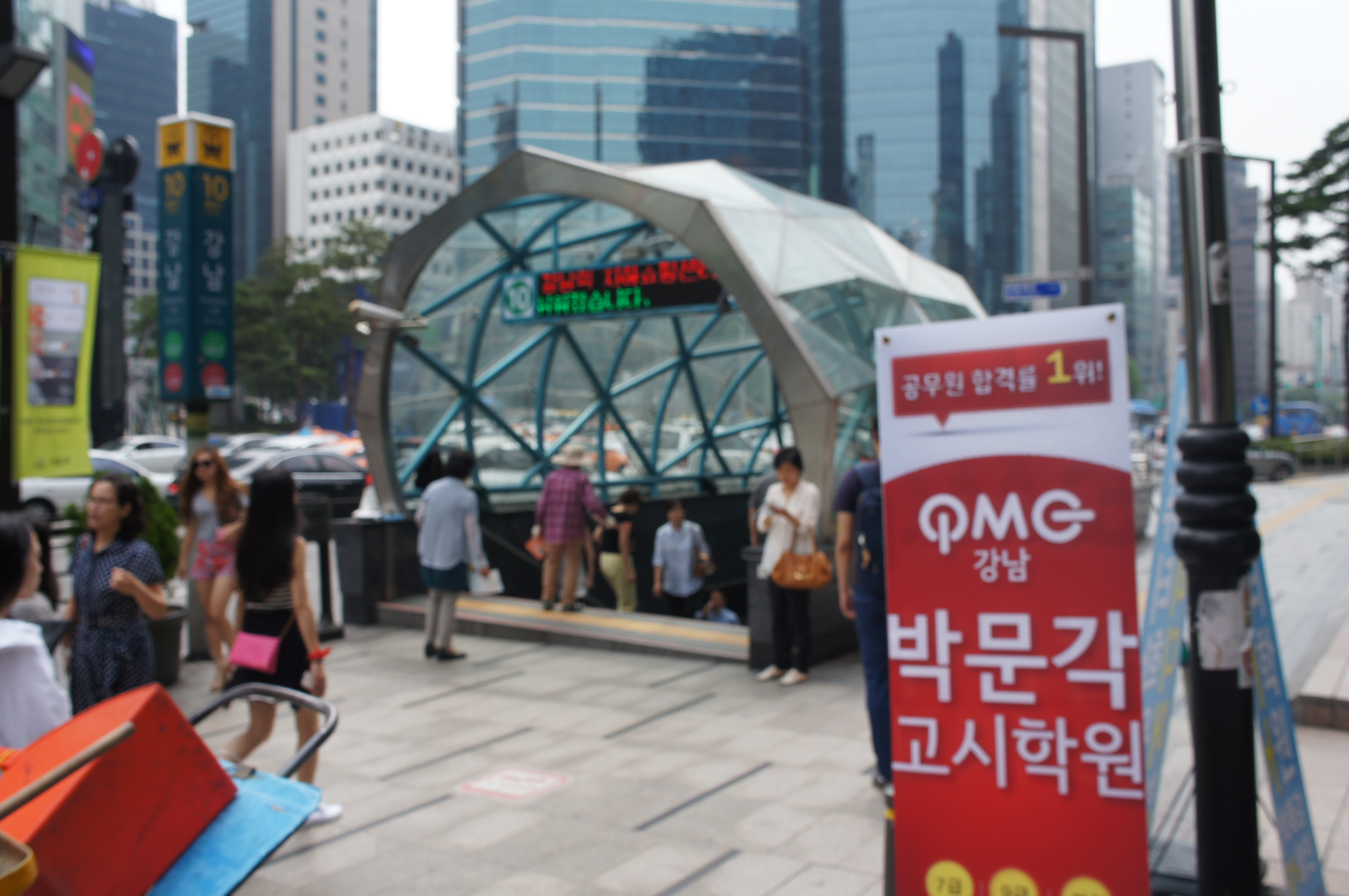 강남역 10번출구